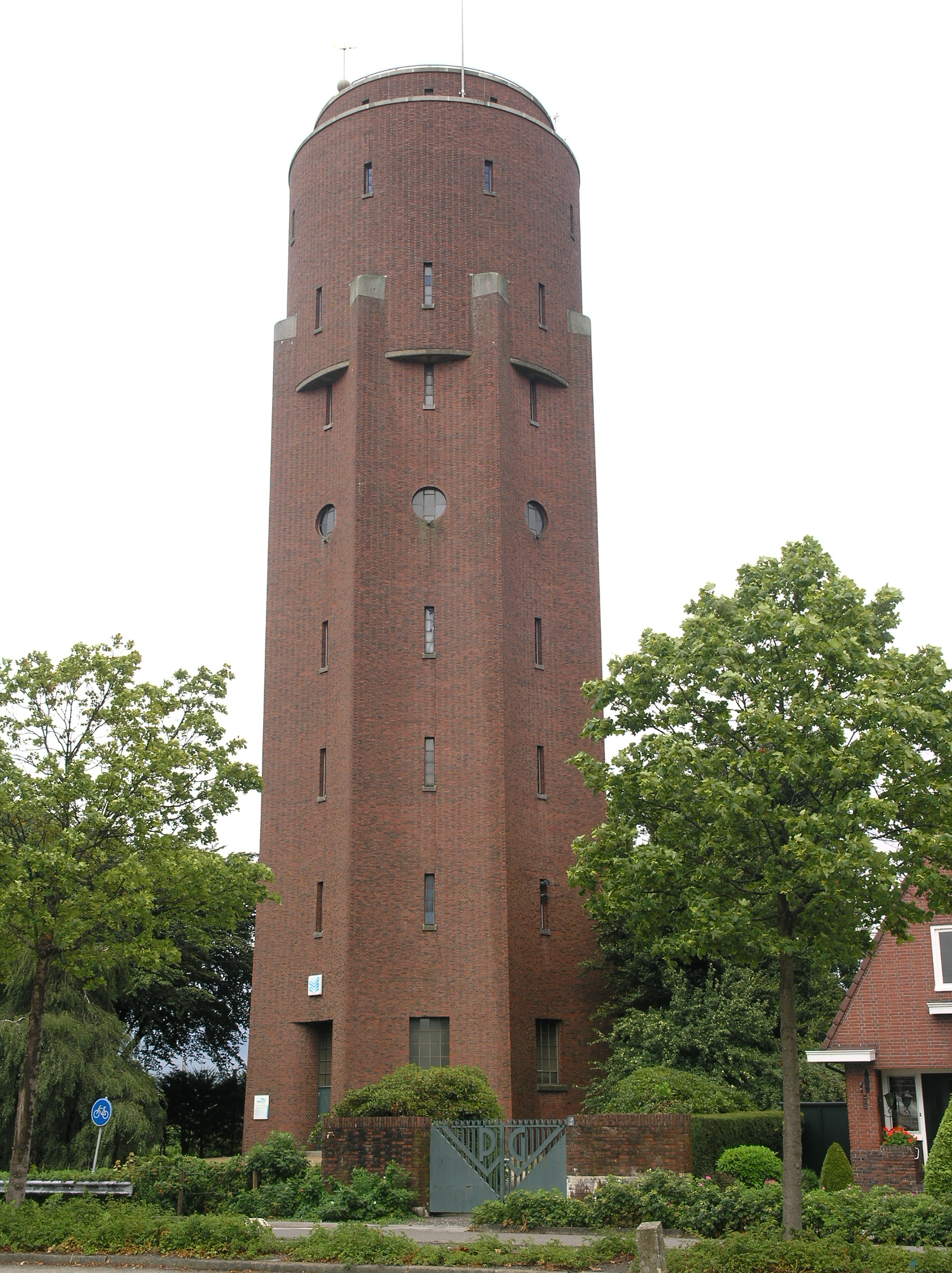 Oude Pekela Watertoren 2006